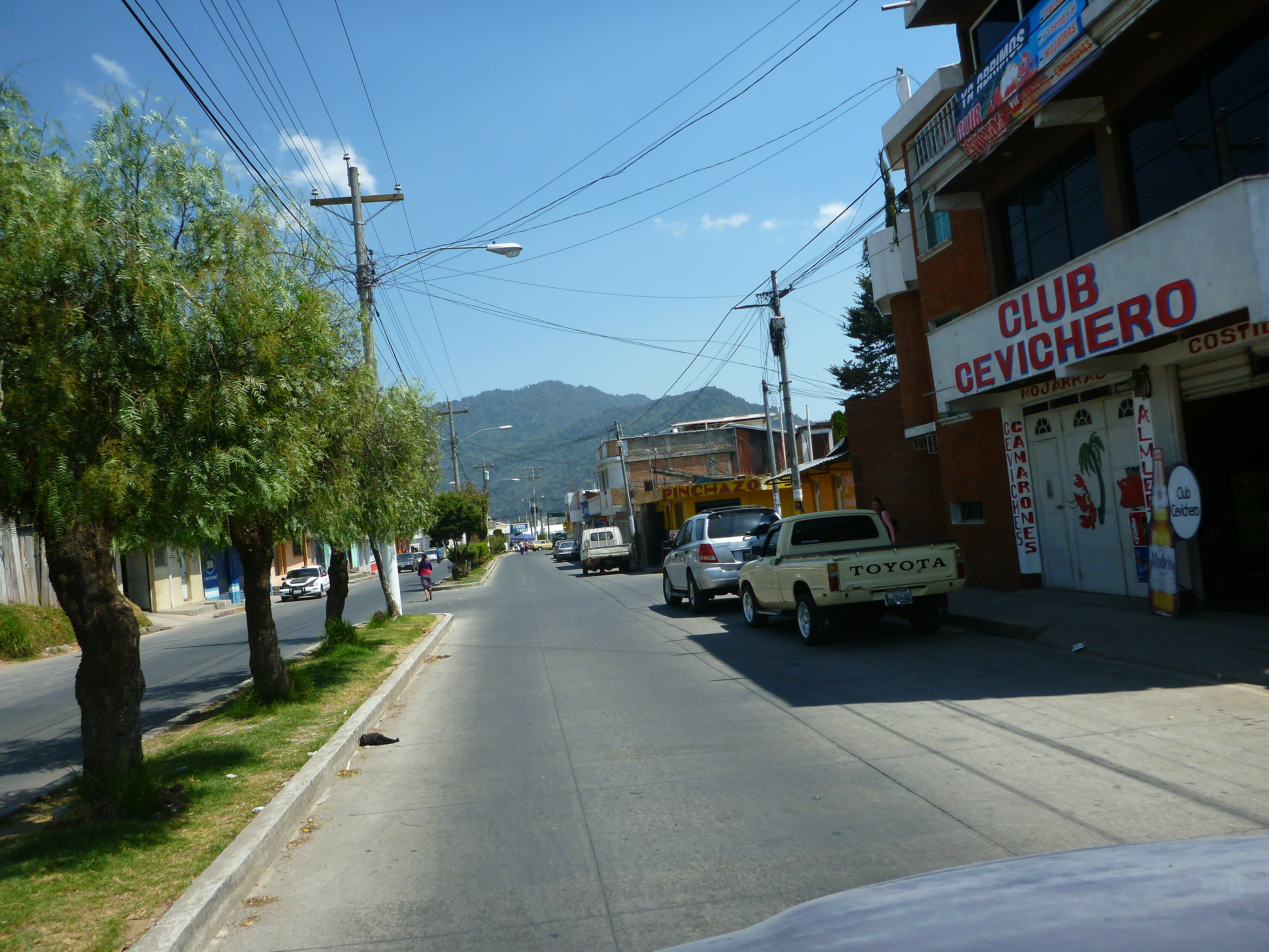 Zona 3 San Pedro, San Pedro Sacatepéquez, Guatemala